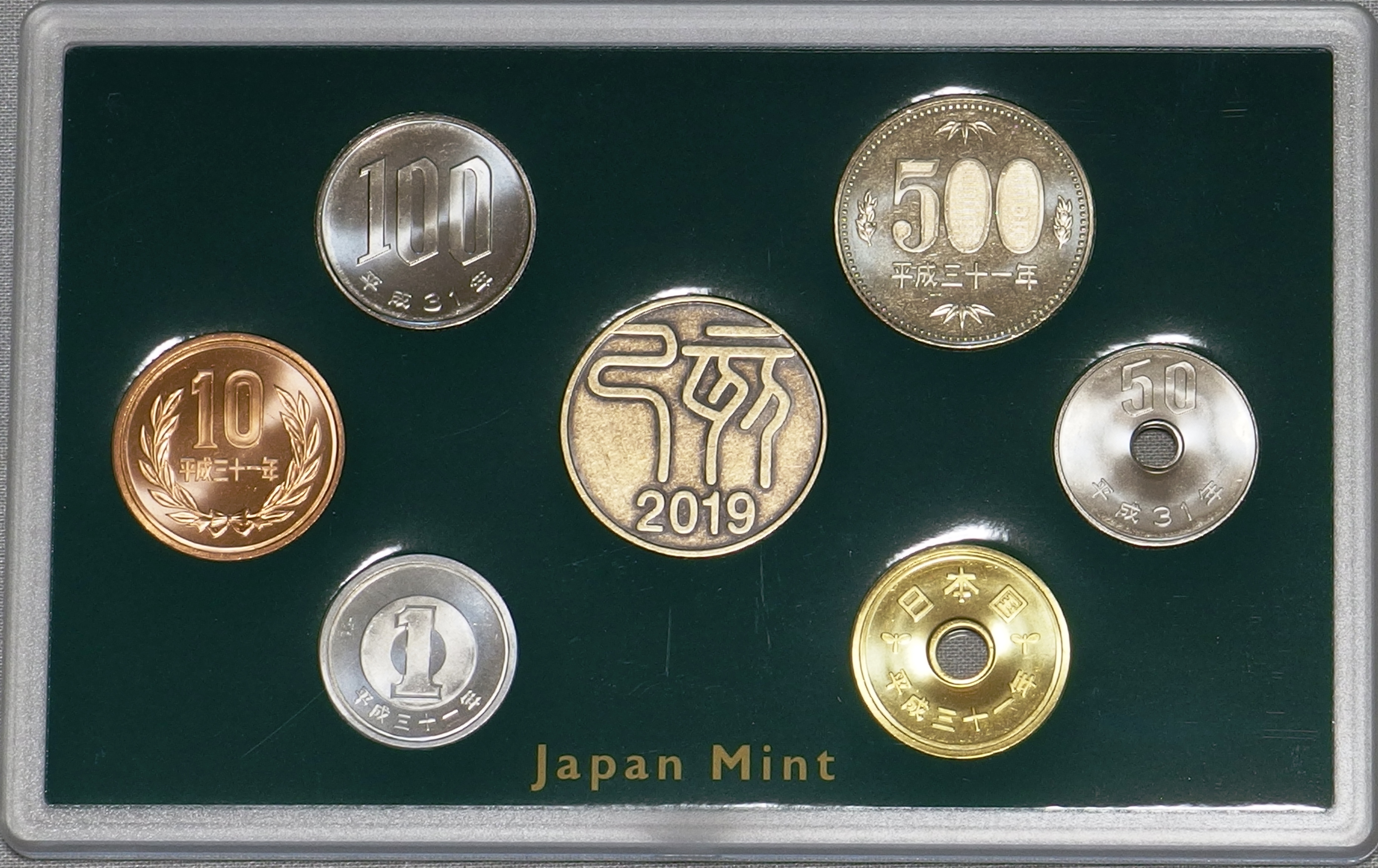 造幣局で販売した貨幣セット（平成31年銘）